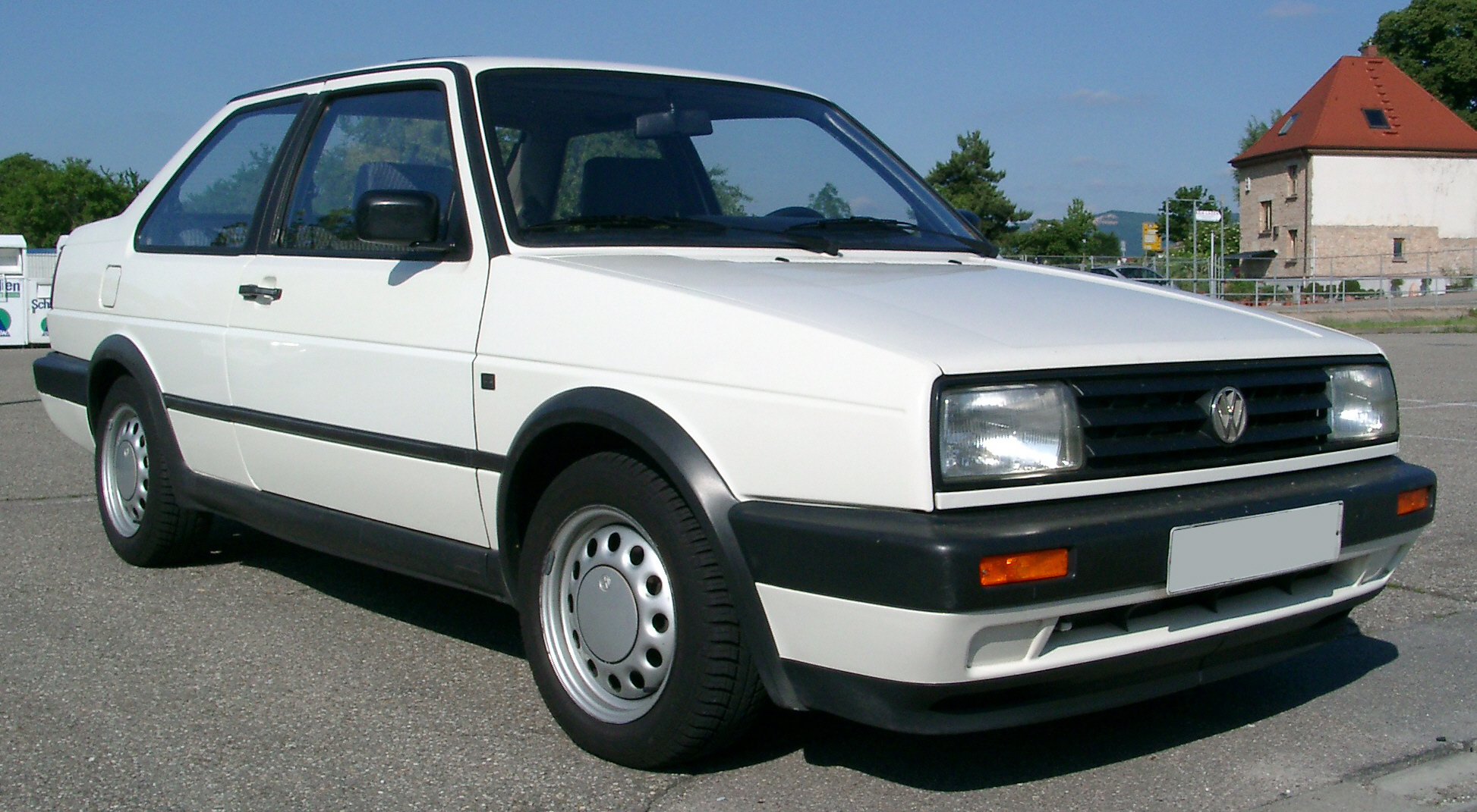 VW Jetta